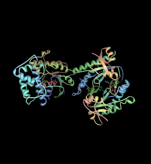 Das Bild mit dem Titel G-Protein zeigt eine 3D-Ansicht des Komplexes eines Gs-Proteins (2GVD). Die räumliche Struktur des Proteins beeinflusst dessen Wirkungsweise. Der α-Abschnitt, der bei einer fibrösen Dysplasie verändert ist, befindet sich unten rechts. Die Strukturdaten des Proteins entstammen der Proteindatenbank PDB (2GVD in PDB). Die 3D-Darstellung wurde mit Protein Workshop erstellt.